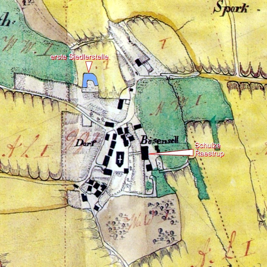 Historische Karte von Bösensell